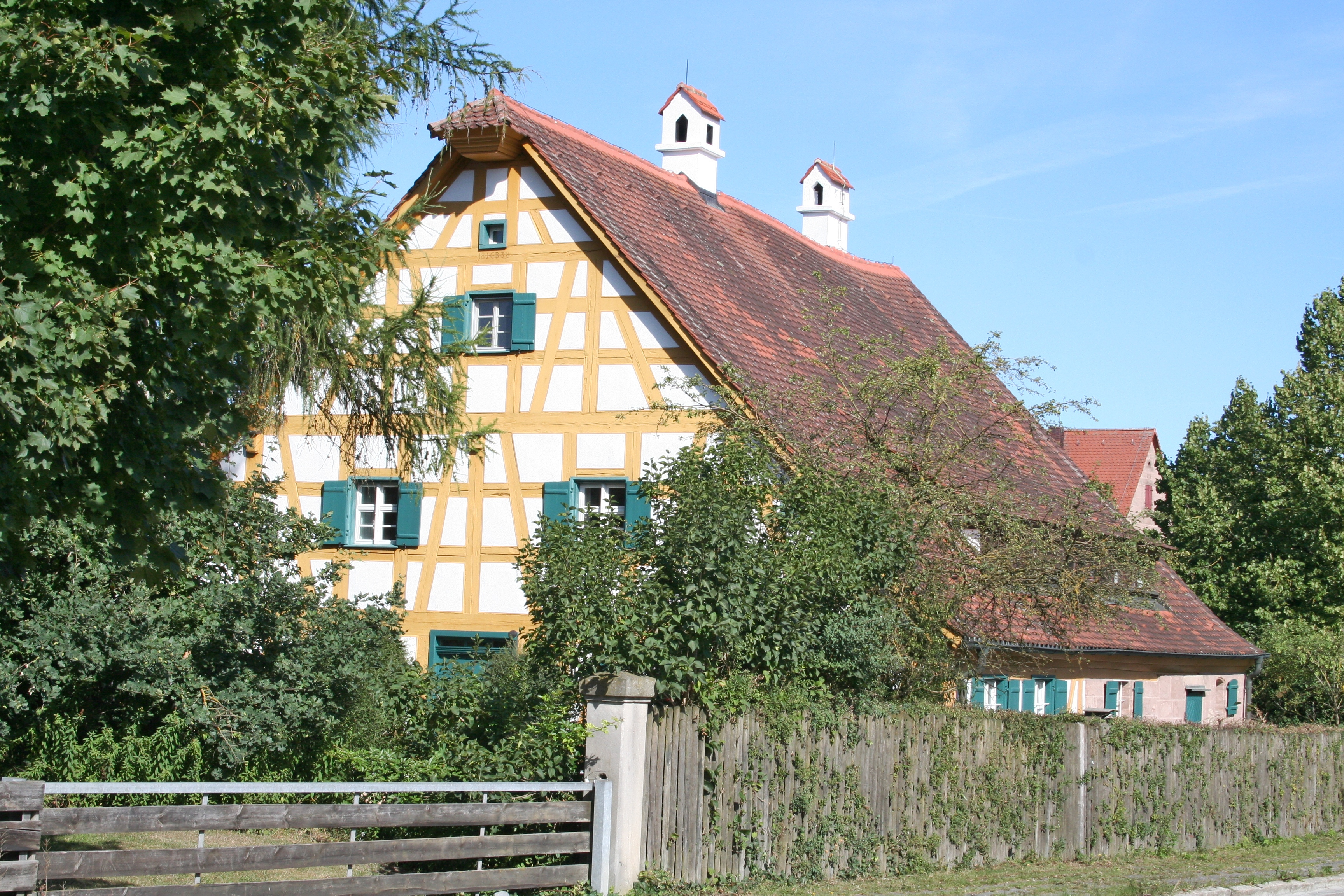 Haus